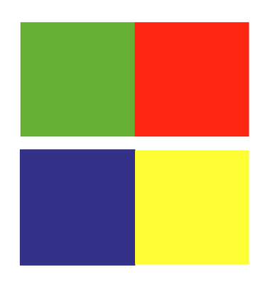 scheda dei colori e degli abbinamenti complementari utilizzati da Van Gogh nell'abbigliamento del contadino ritratto nell'opera "Il Giardiniere"